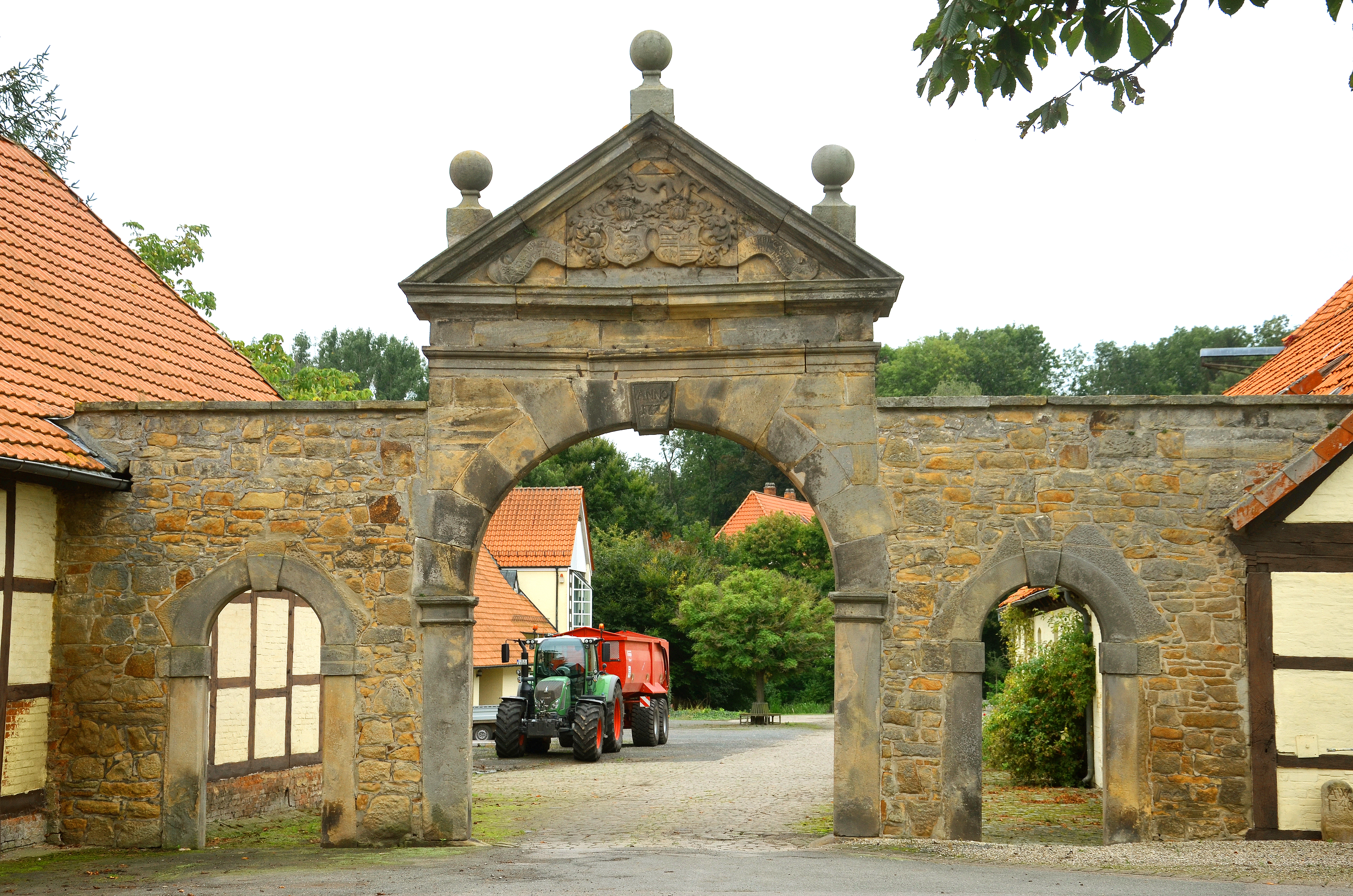 Das Rittergut Bockerode am Bockeroder Holz in Mittelrode wird von der Straße Gut Bockerode durch dieses sandsteinerne, monumentale Eingangstor mit seiner tympanonähnlichen Bekrönung, den Wappen und der Inschrift der damaligen Bauherren erschlossen ...